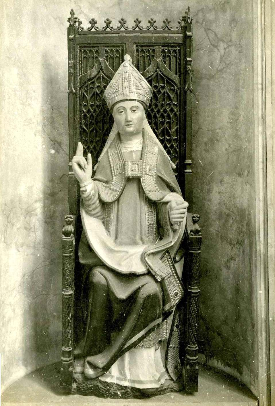 Statue de saint Ouen assis, XIVe siècle (œuvre disparue).